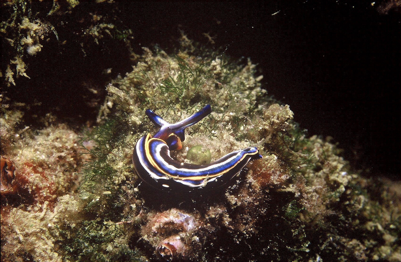 Thuridilla hopei se nourrit aussi de Pseudochlorodesmis furcellata - obs. pers. - Banyuls-sur-Mer : 07/88